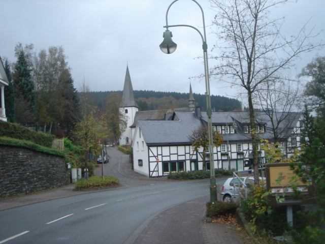 Eslohe im Hochsauerlandkreis